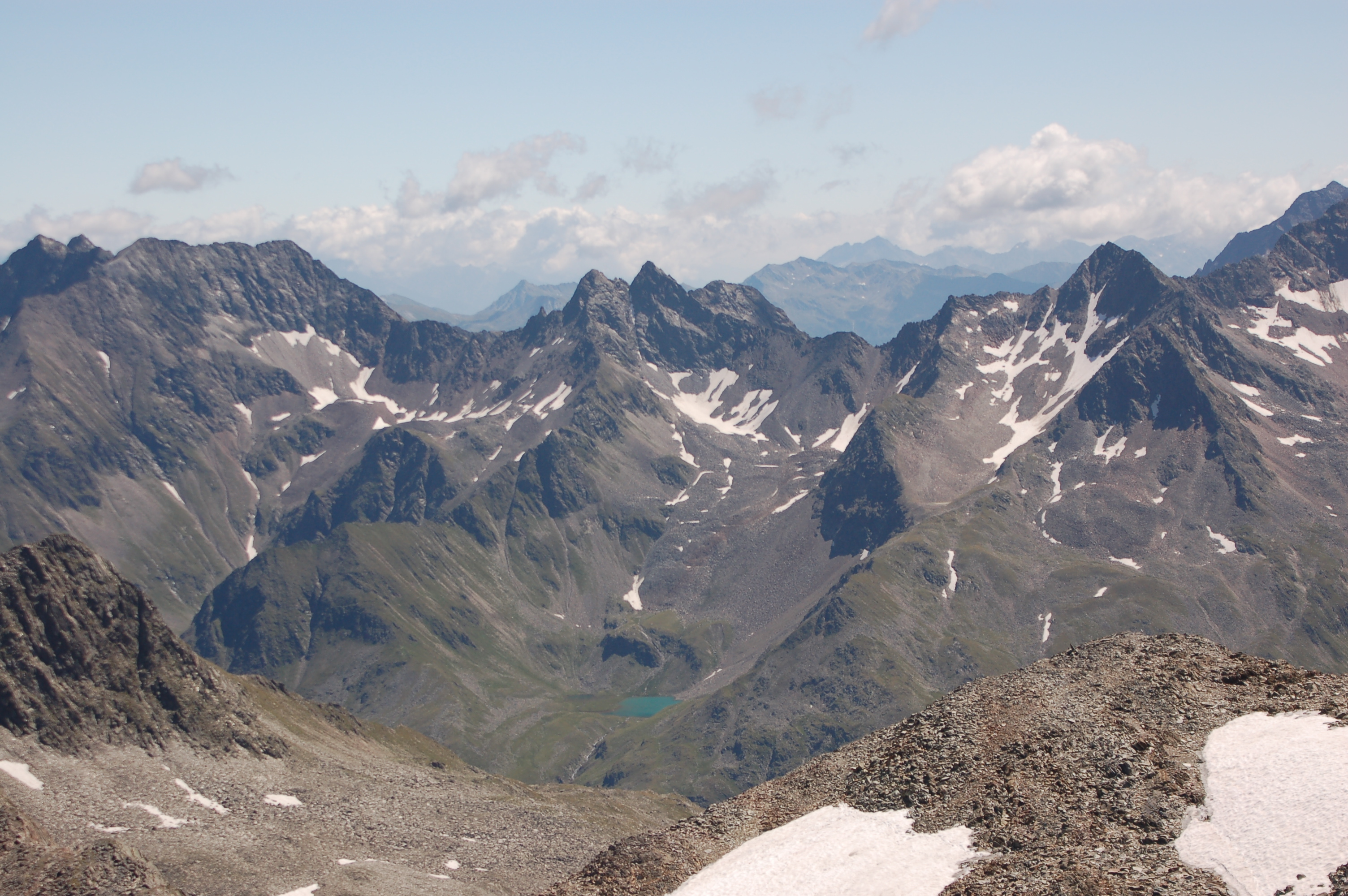 Karlkamp, Hohes Beil, Brentenköpfe, Großer Friedrichskopf vom Bösen Weibl. Blick nach Osten